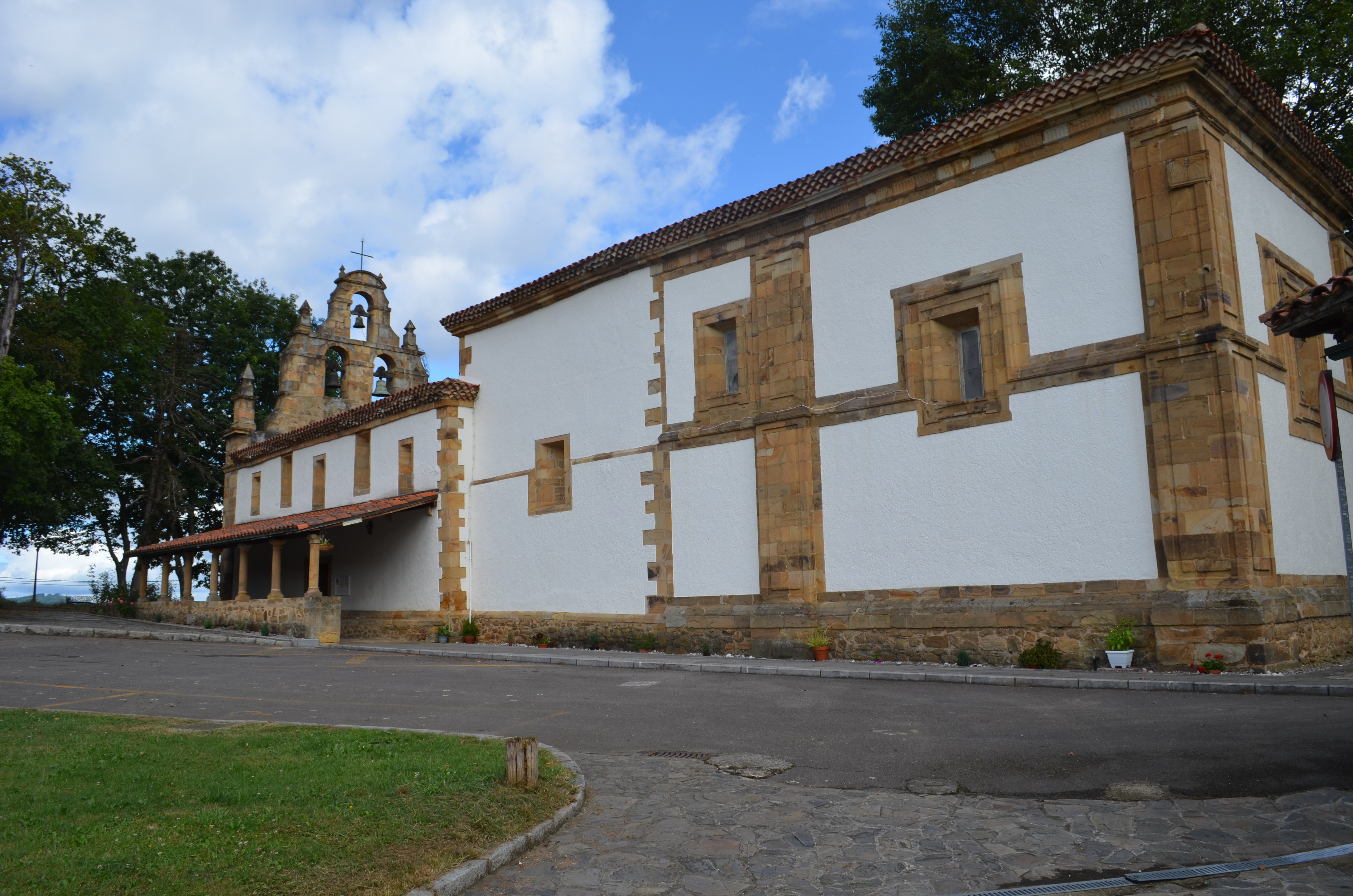 Santuario de El Carbayu en Langreo, Asturias, España